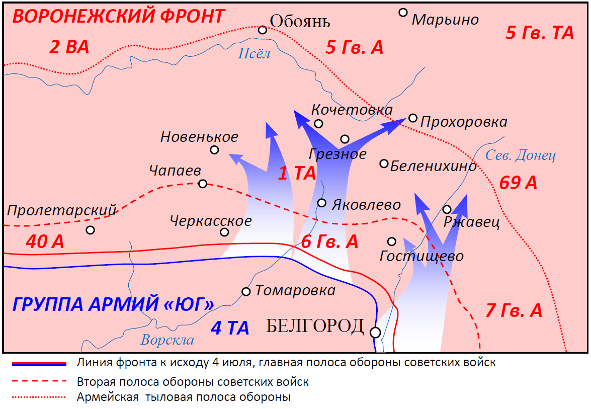 Курская дуга, район Белгорода, положение на исход 4 июля 1943 года (к началу боёв). Указаны направления последовавших 5–15 июля ударов немецких войск. 48-й танковый корпус немцев (левая стрелка) наступает из района северо-западнее Томаровки на Черкассоке и Обоянь, 2-й корпус СС (средняя стрелка) — из района Томаровки на Грезное. Для обеспечения главного удара 3-й танковый корпус (правая стрелка) наступает из района Белгорода на Корочу. Источник: Великая Отечественная война Советского Союза, 1941–1945. Краткая история. Издание 2-е, испр. и доп. — М.: Изд-во МО, 1970, 632 с.